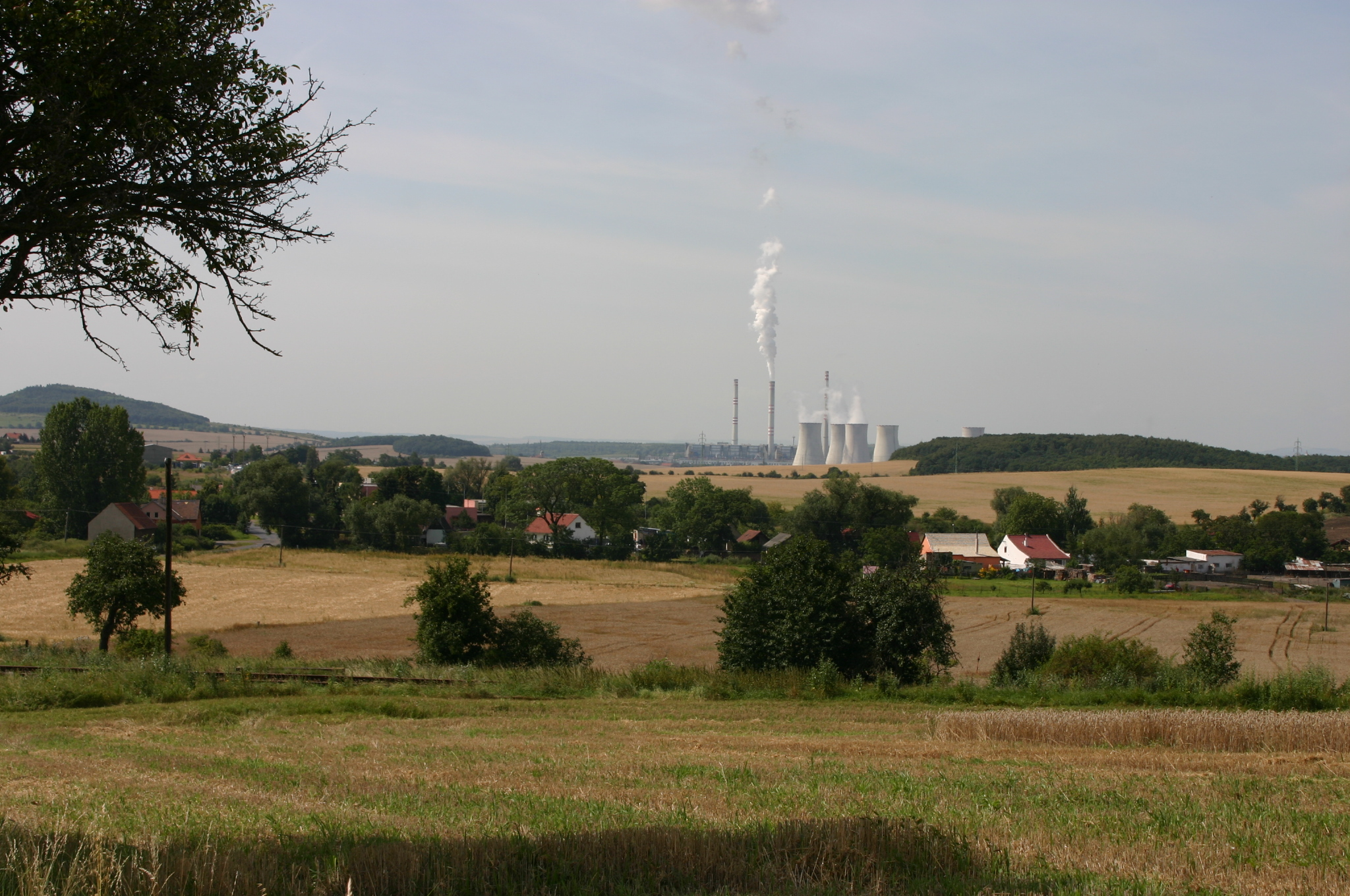 Osada Zaječice v okrese Most (střed)